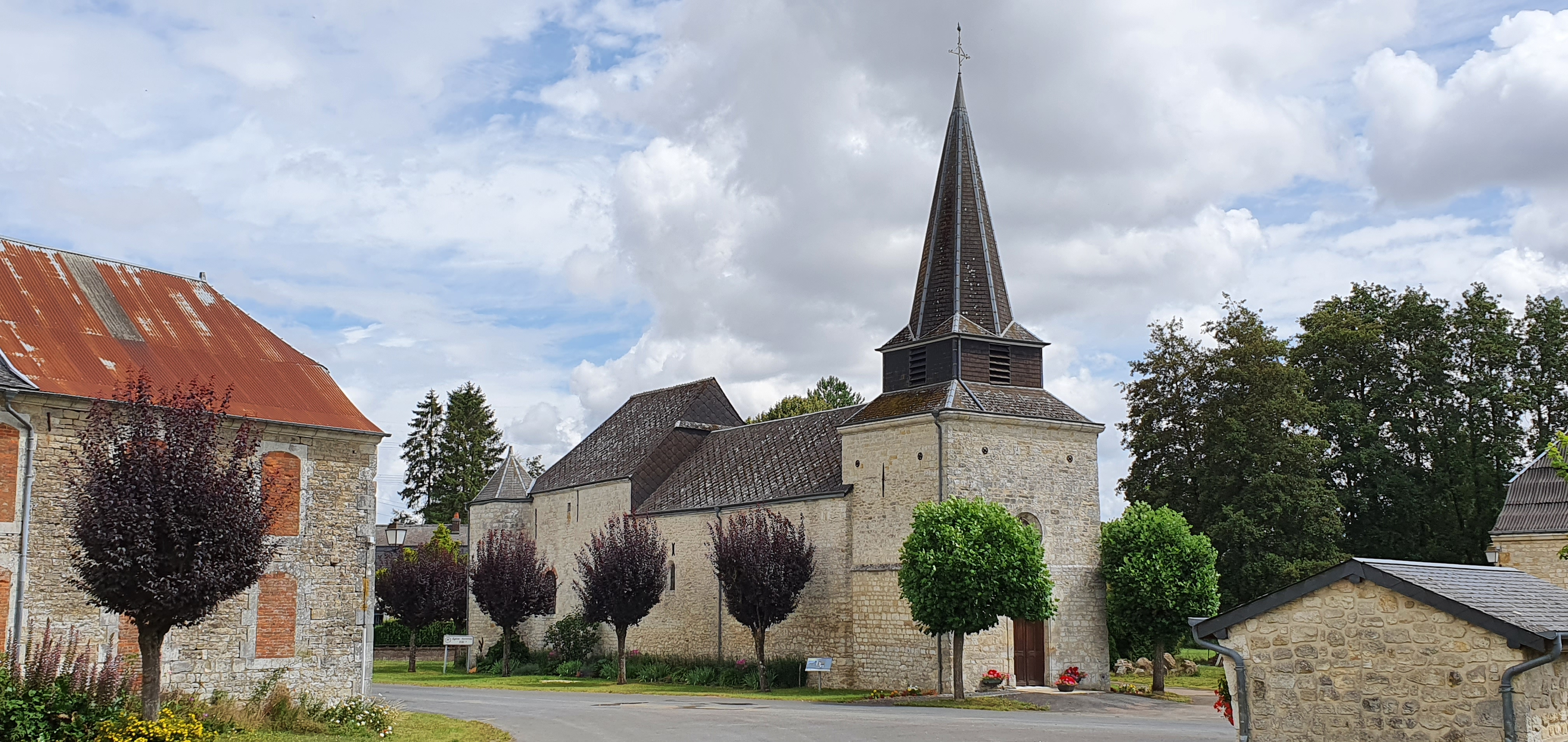 Église Saint-Martin de Bossus-lès-Rumigny 05